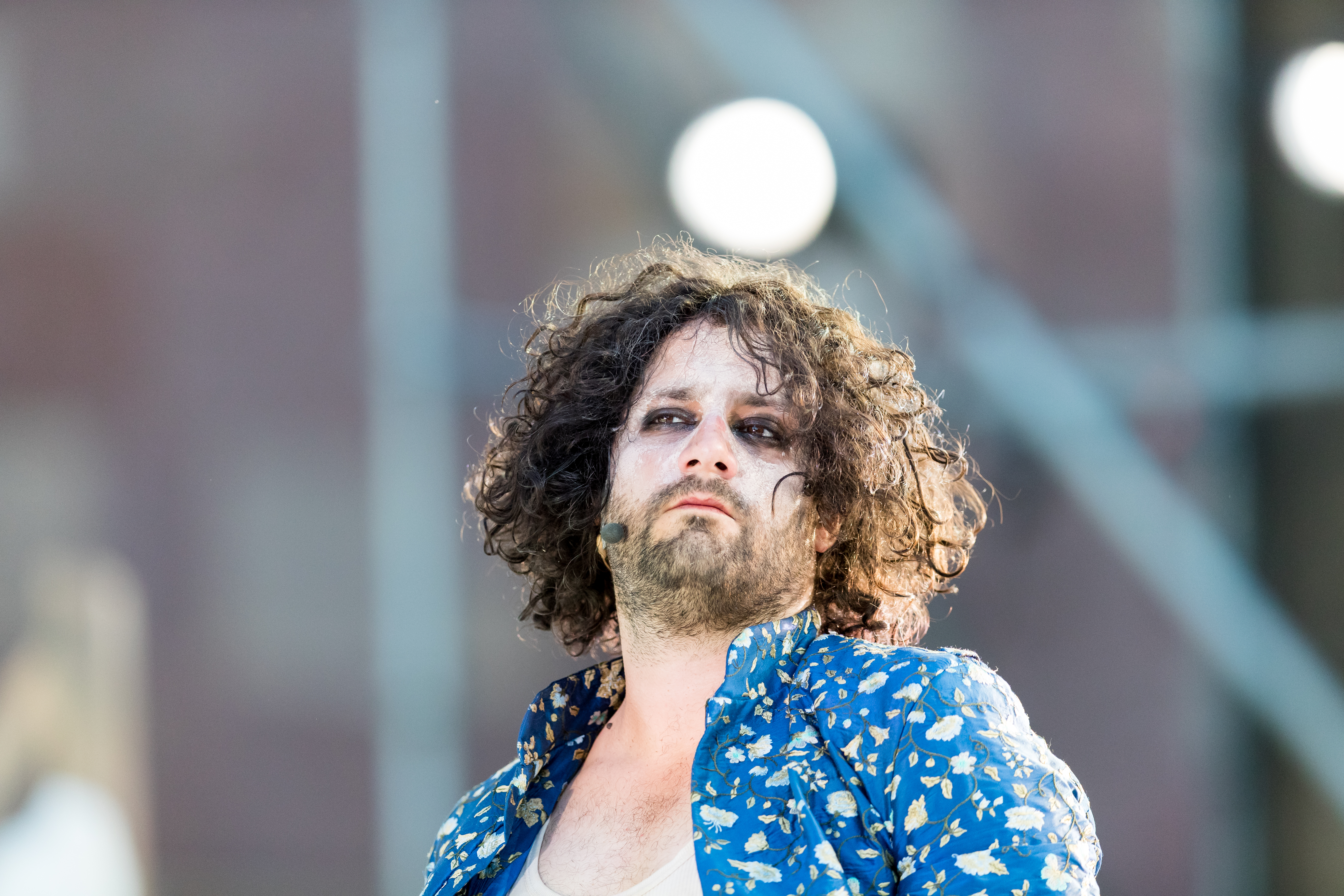 Edgar Eckert during Nibelungenfestspiele ( at Worms, Rheinland-Pfalz, Germany on 2019-07-10, Photo: Sven Mandel